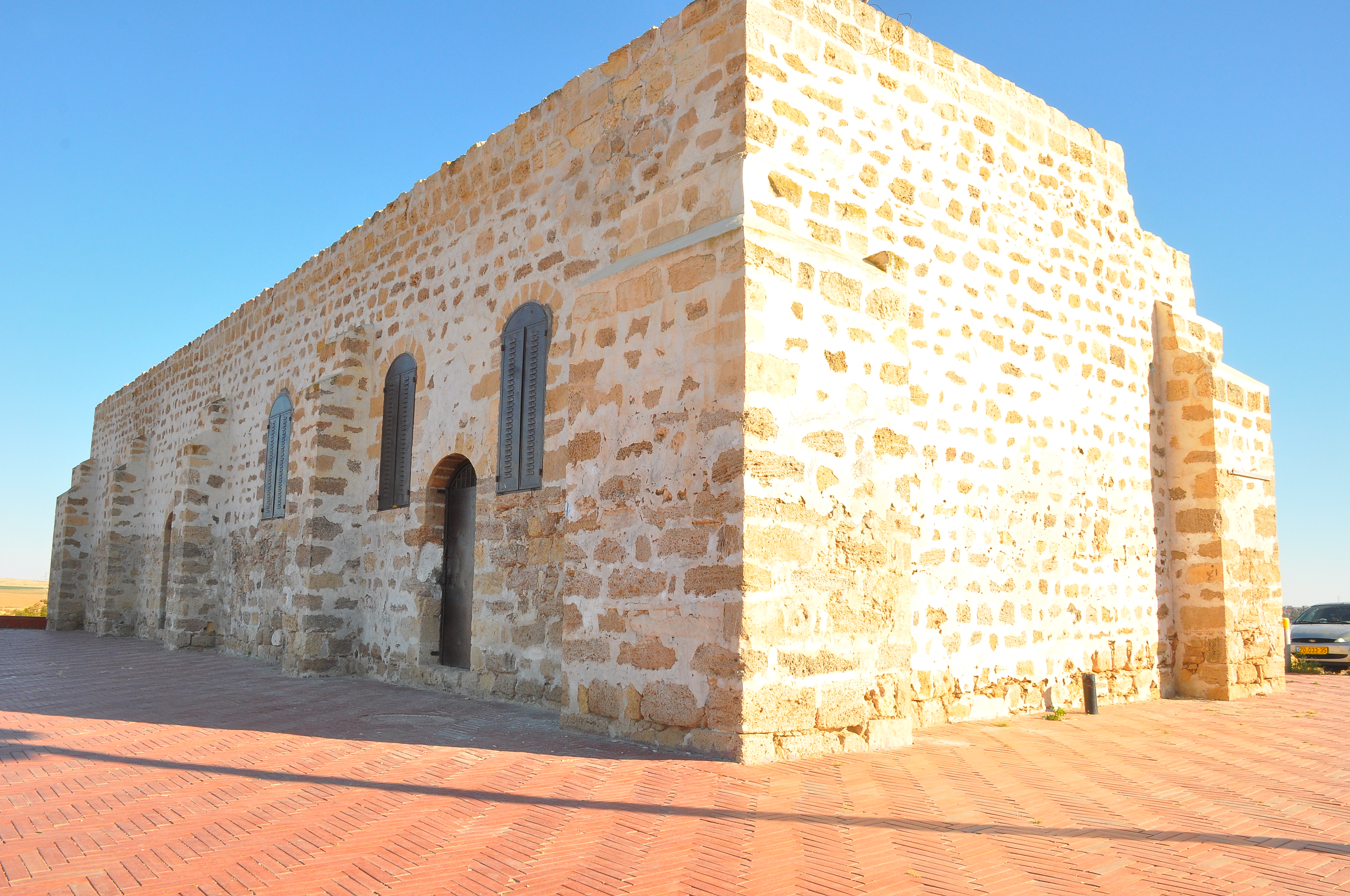 מערת אלג'ריר ממבט מבחוץ 2015